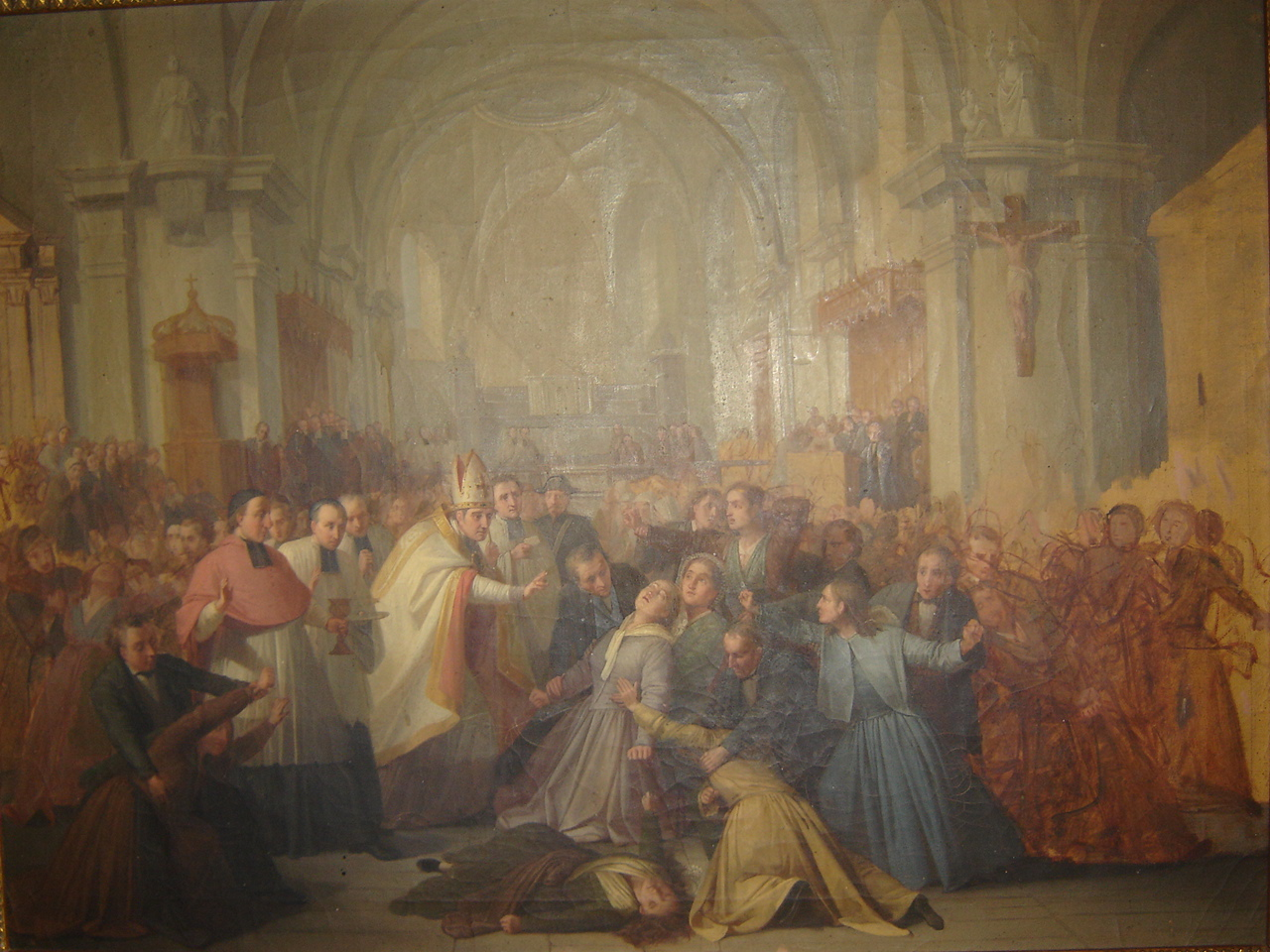 Second tableau réalisé (et terminé) sur la grande crise des possédées de Morzine, en 1864